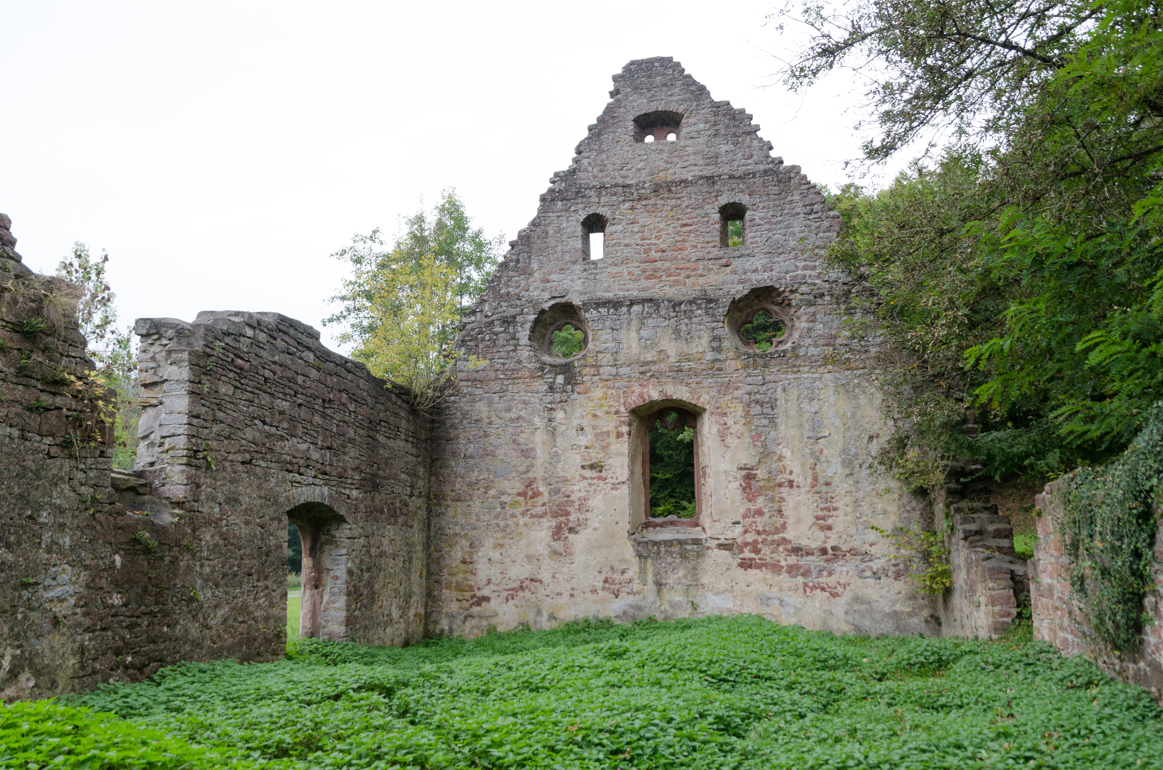 Schollbrunn, Markuskapelle